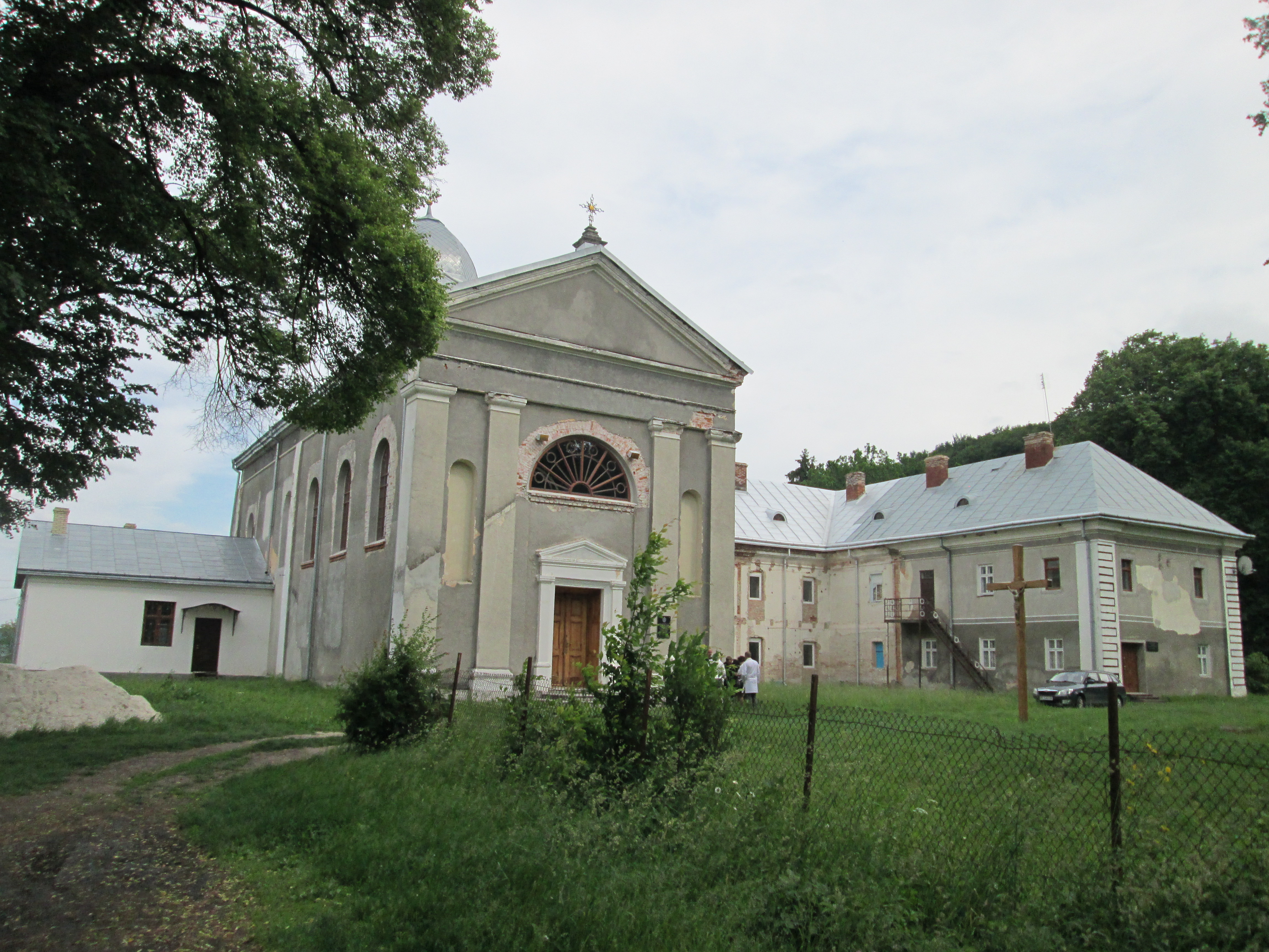 Монастир Різдва святого Івана Хрестителя в селі Краснопуща Бережанського району Тернопільської області.